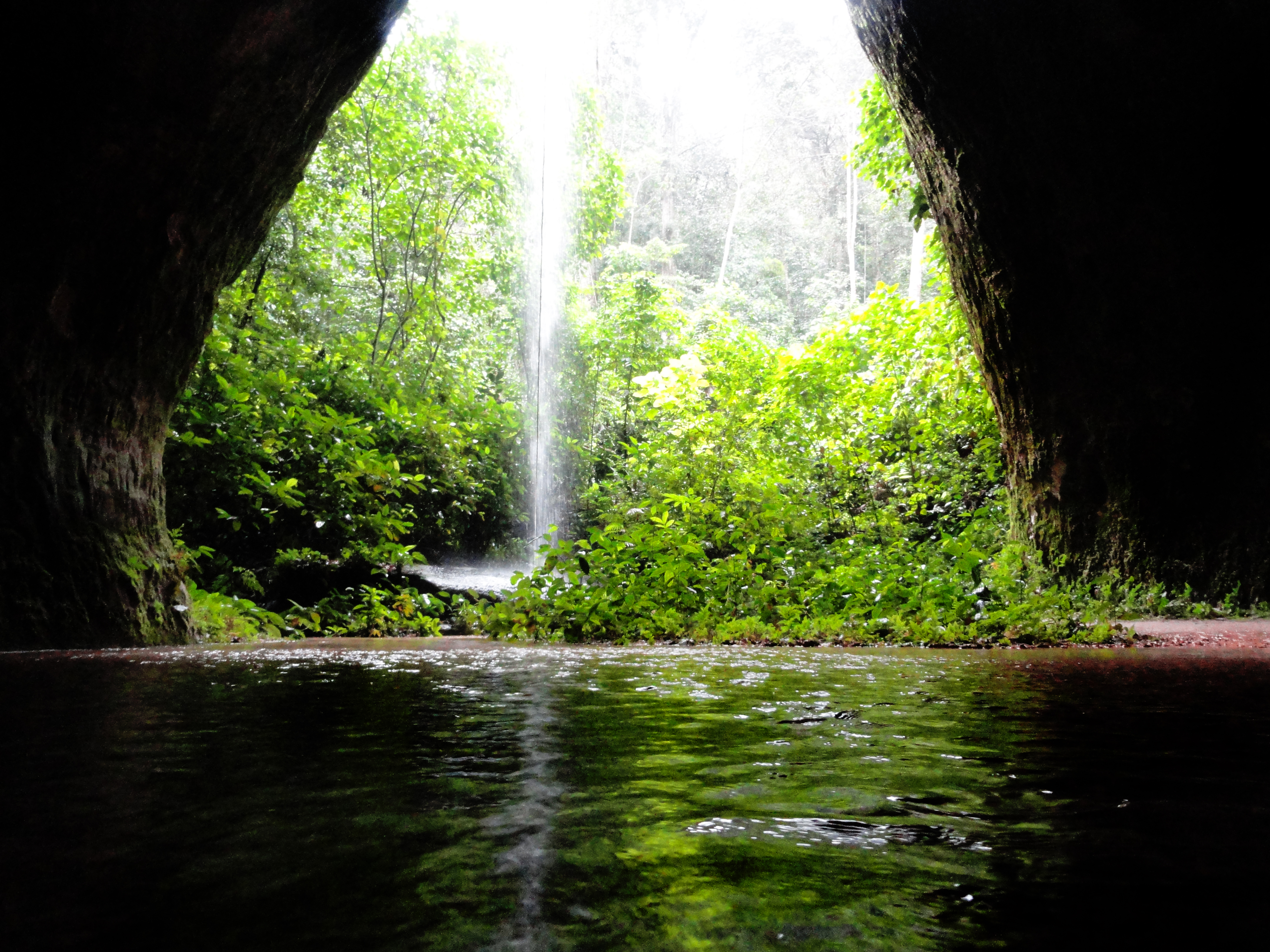 Caverna Maroaga